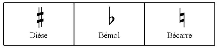 Description : Altérations simples Source : Personnelle Licence : GFDL